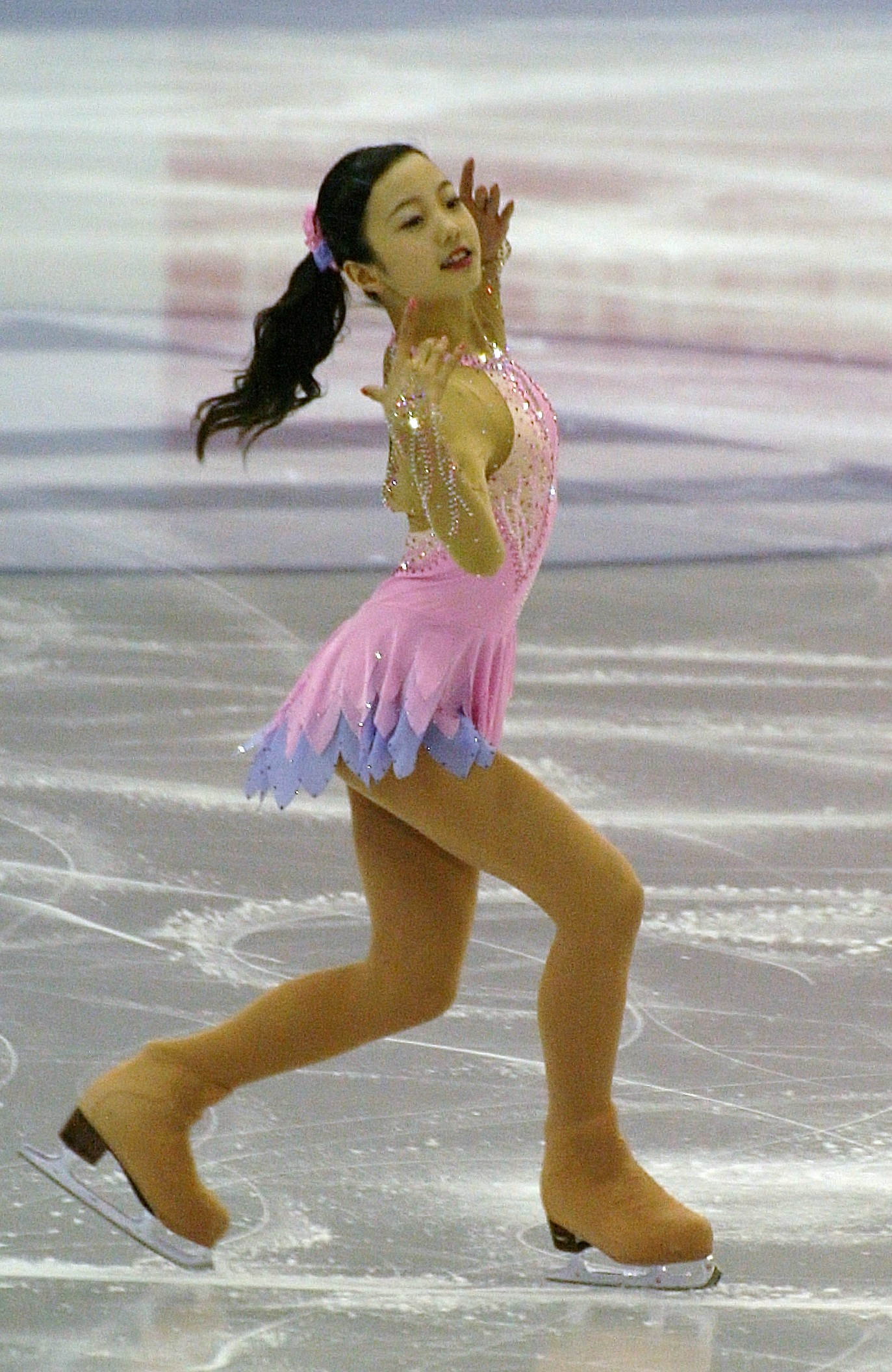 Марин Хонда (Япония) на финале Гран-при по фигурному катанию среди юниоров 2015-2016.